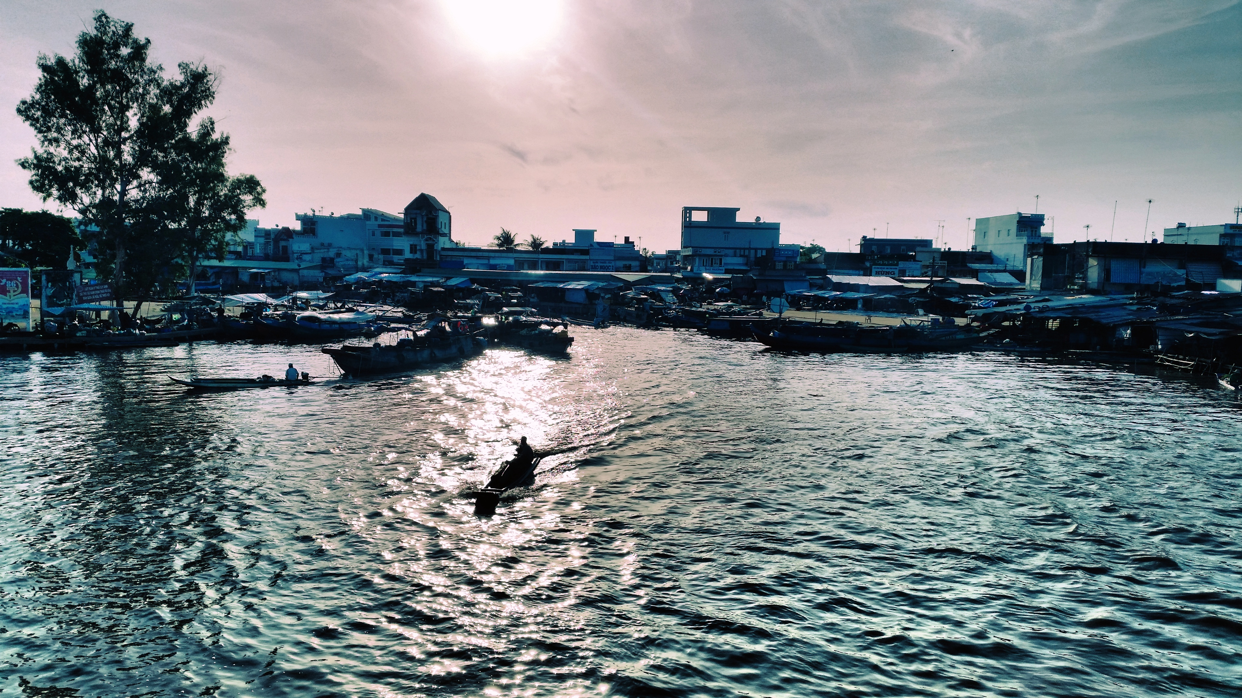 Chợ Cái Nước